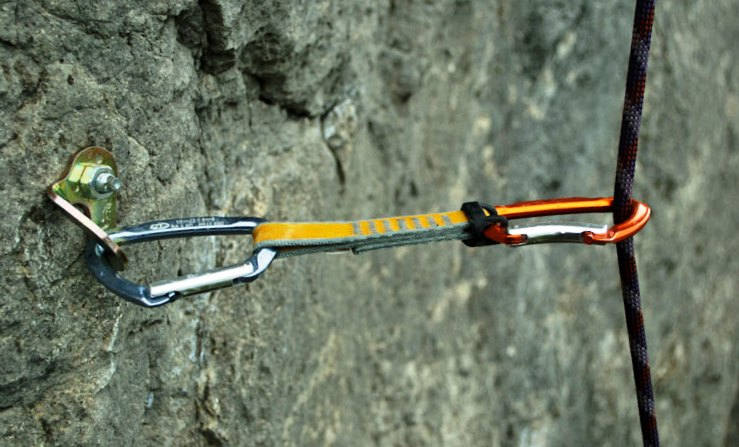 Один карабин оттяжки вщёлкнут в шлямбур на скале, в другом карабине - страховочная верёвка